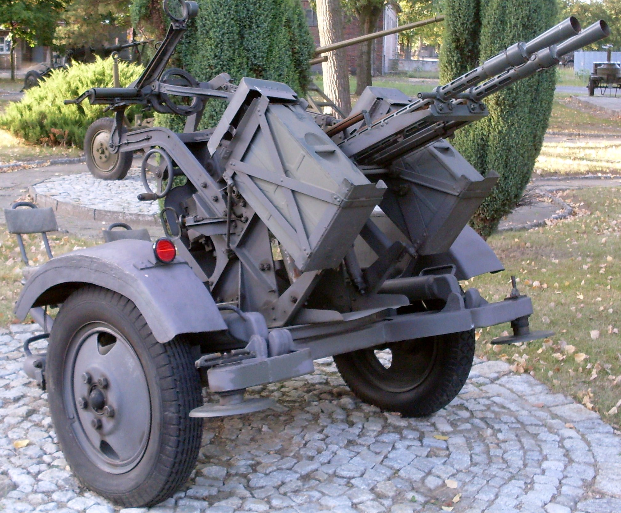 14,5mm wkm ZPU - 2